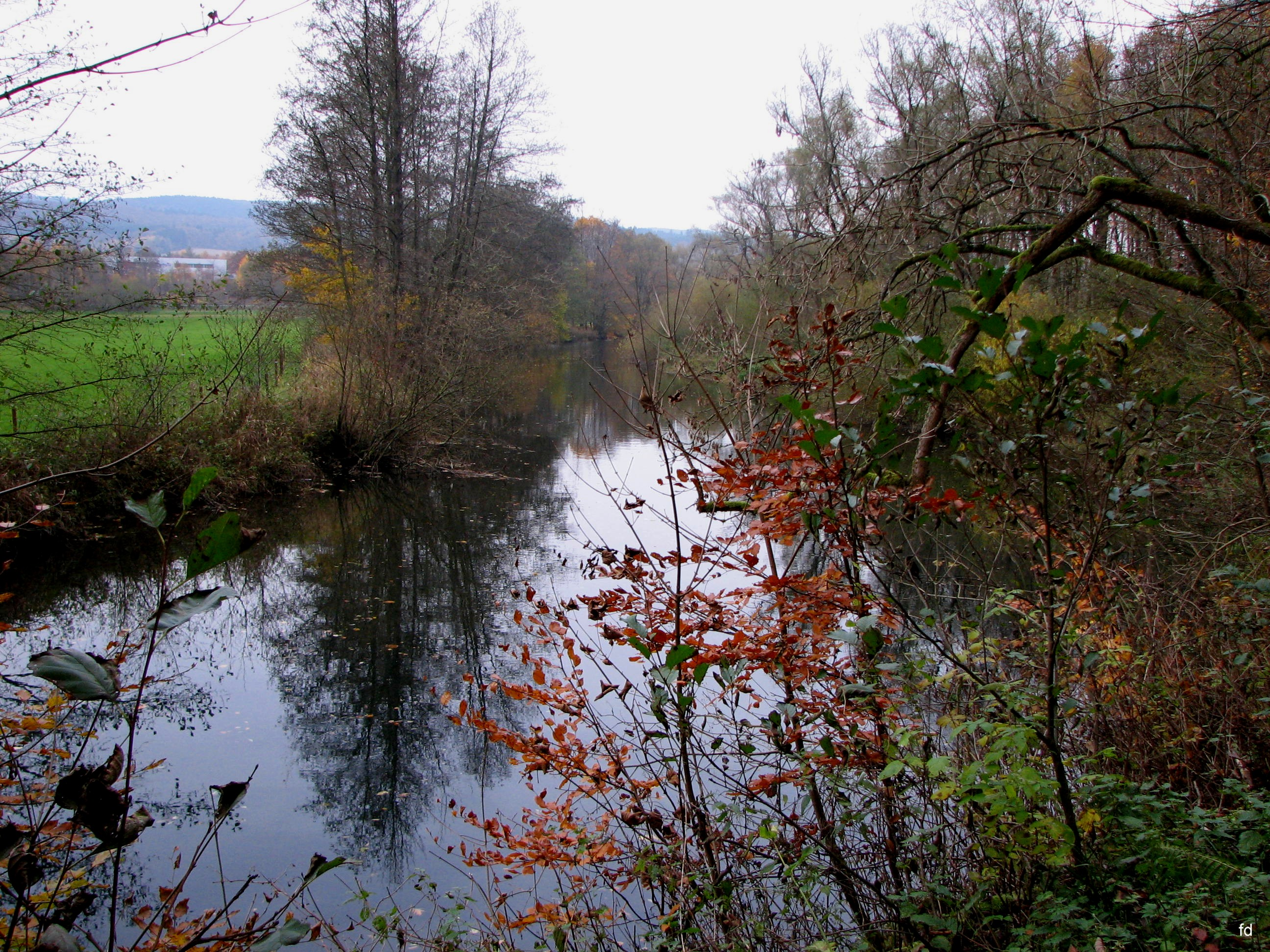 Die Ruhr, NSG Ruhrtal bei Laer (HSK-16)